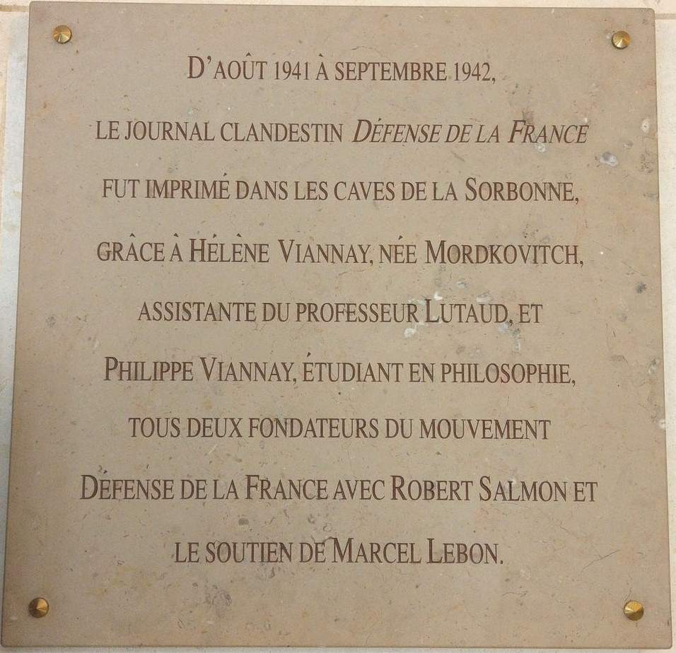 Plaque commémorative du réseau Défense de la France dans l'enceinte de la sorbonne. Elle mentionne Hélène Viannay, Philippe Viannay, Marcel Lebon, Robert Salmon.